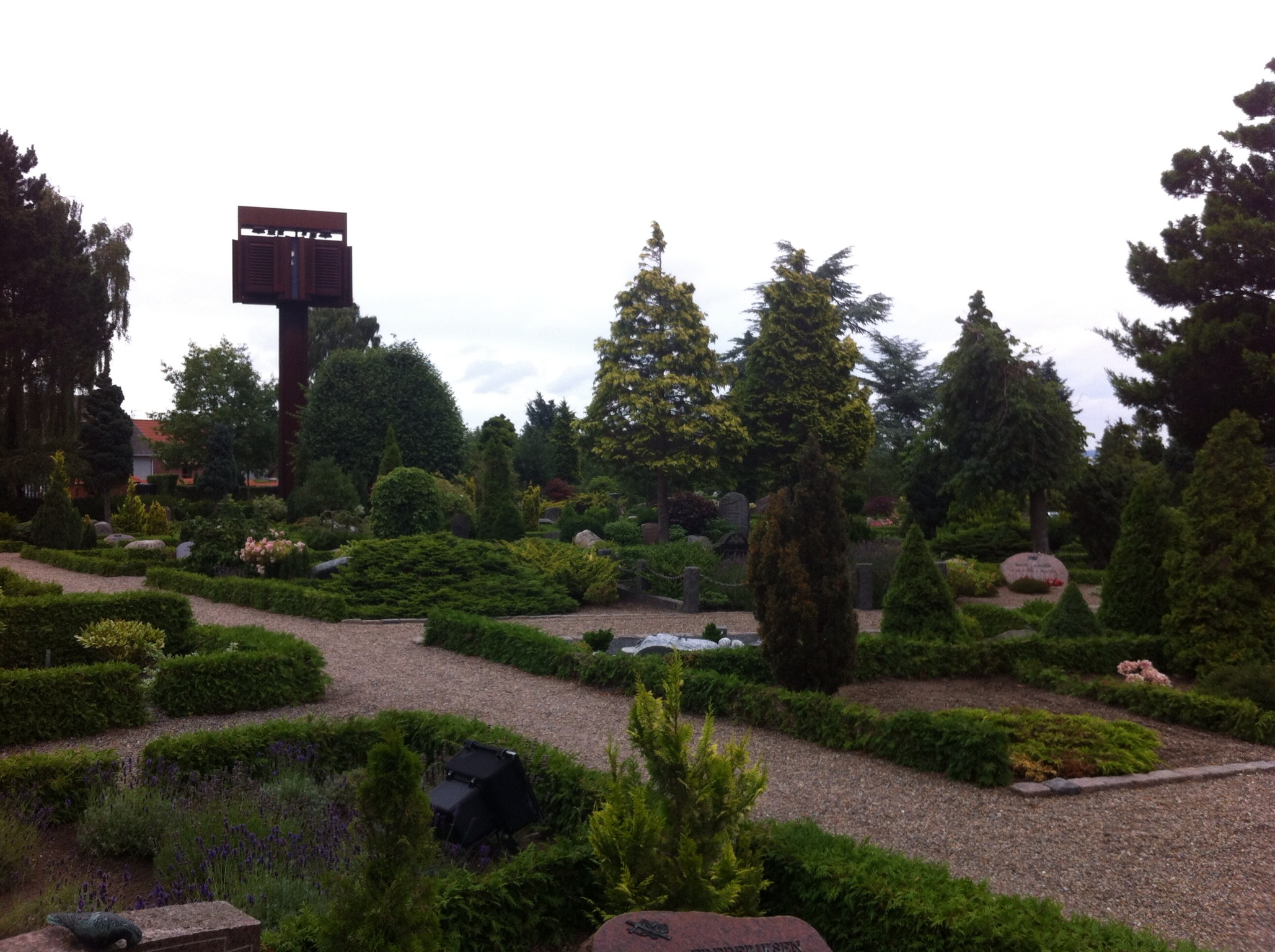 Hadsund Kirkegård.